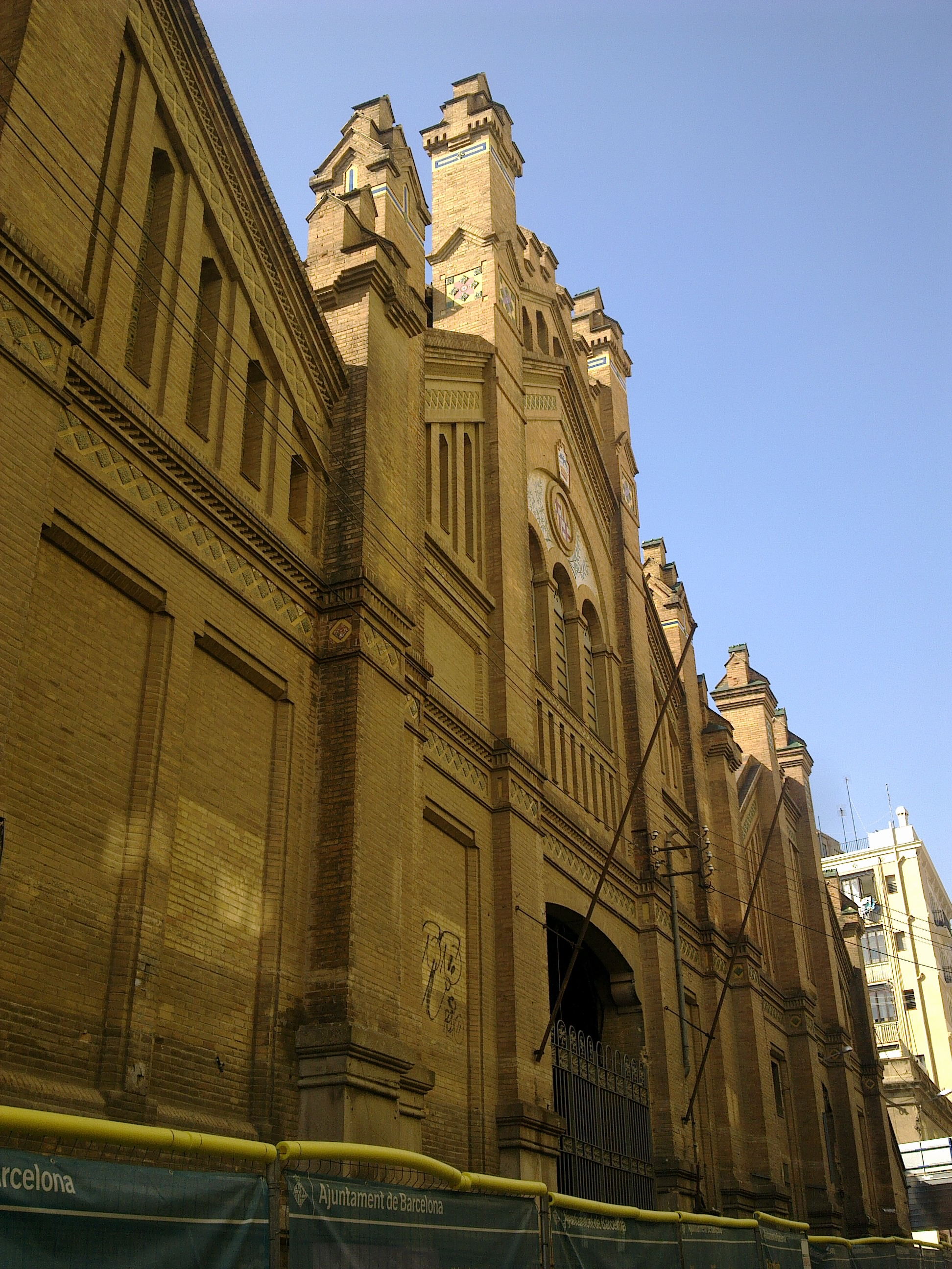 Barcelona